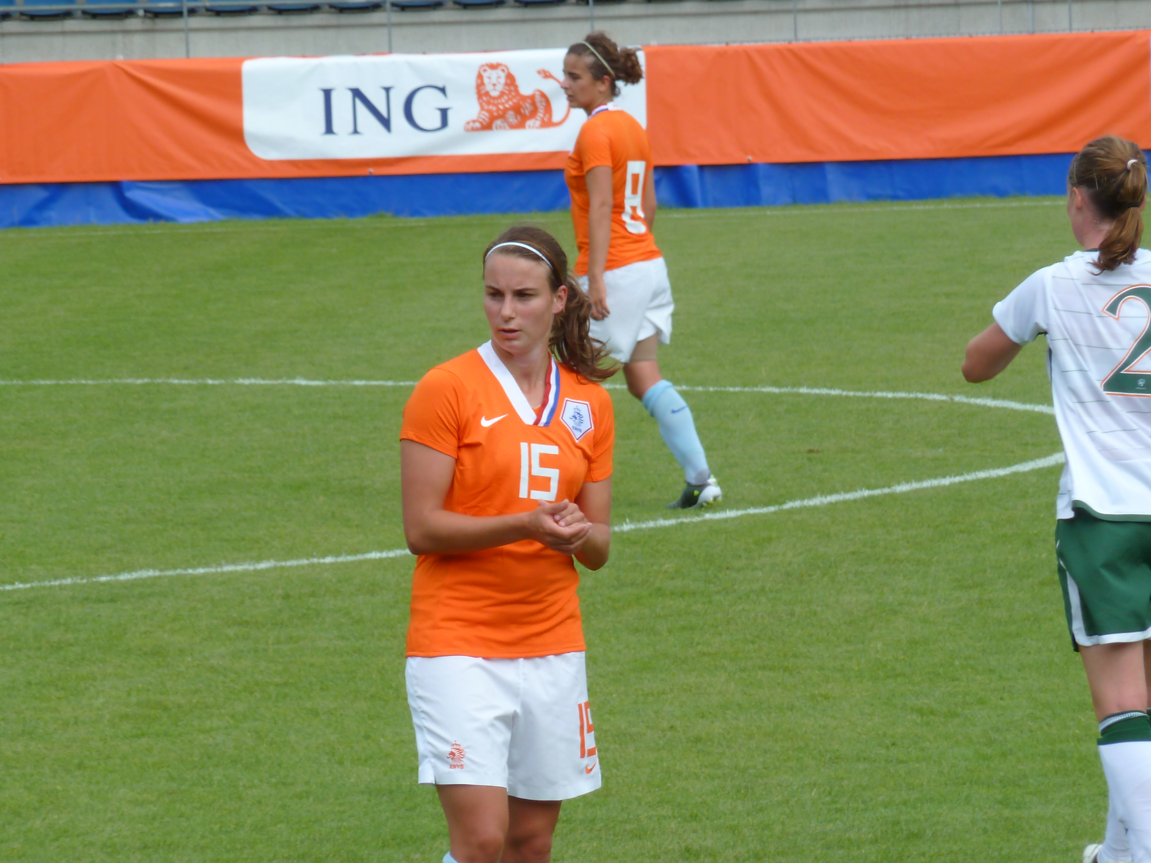 Renate Jansen tijdens de oefenwedstrijd Ned-Ier op 15-8-2010